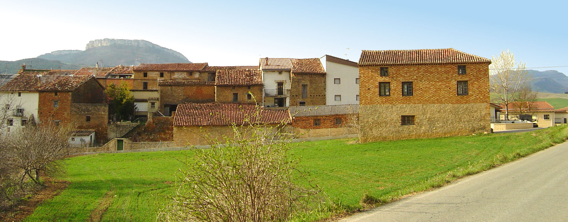 Genevilla. Alto Ega. Navarra. Spain.